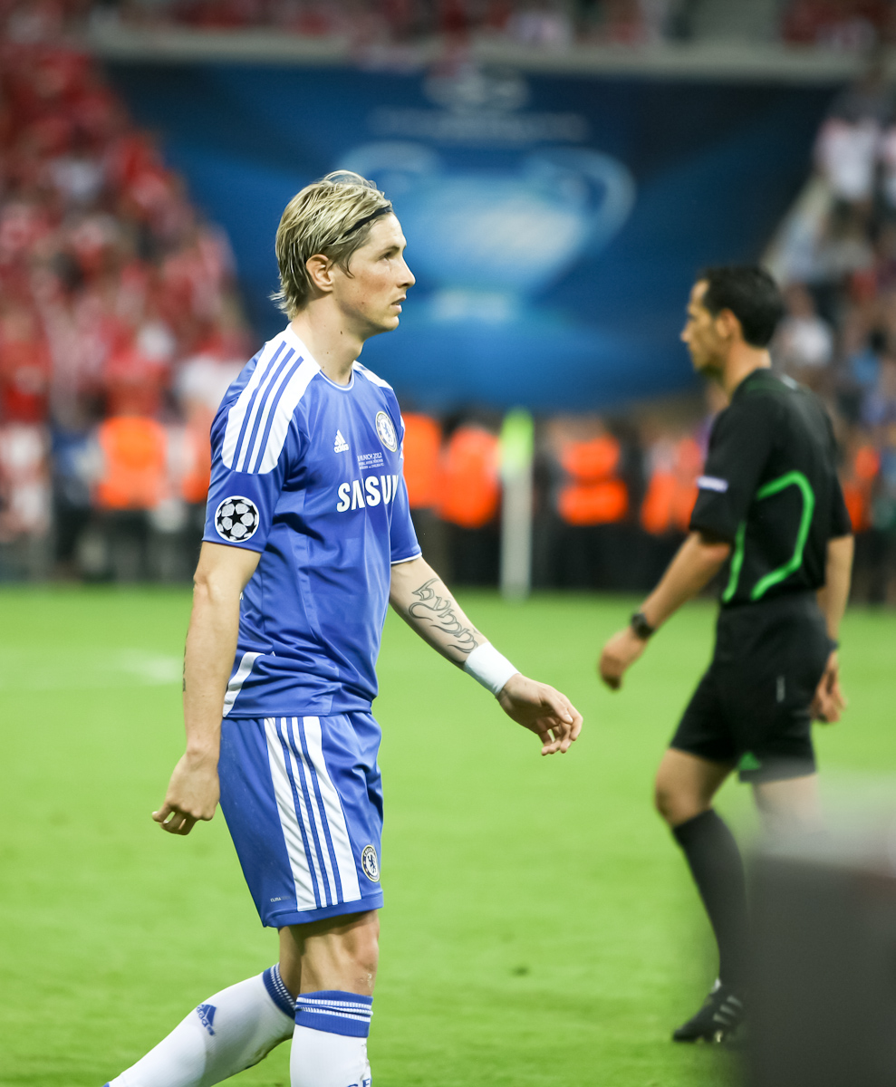 RA1_6302